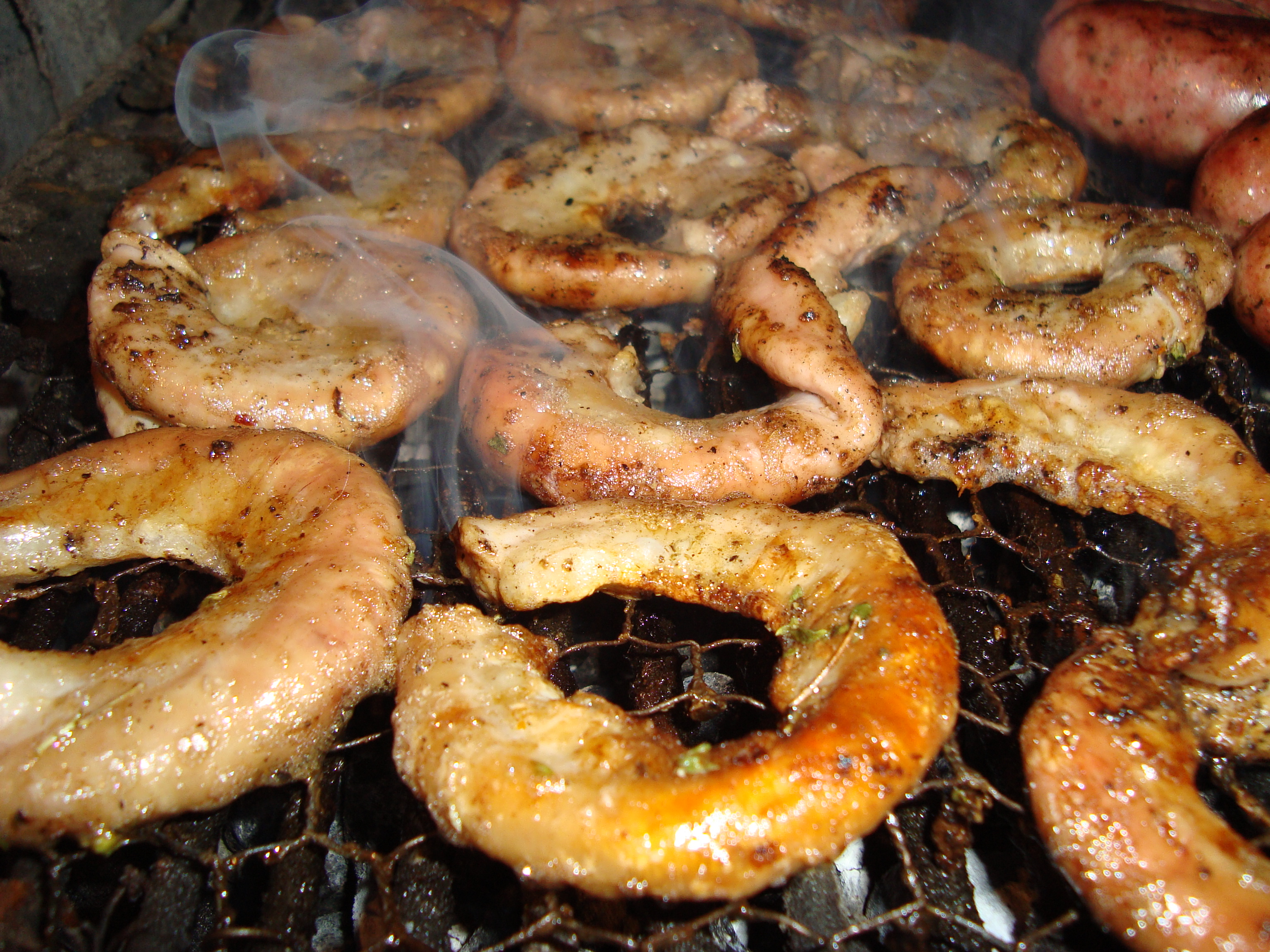 Chinchulines